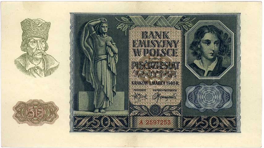 50 złotych = 25 Reichsmark